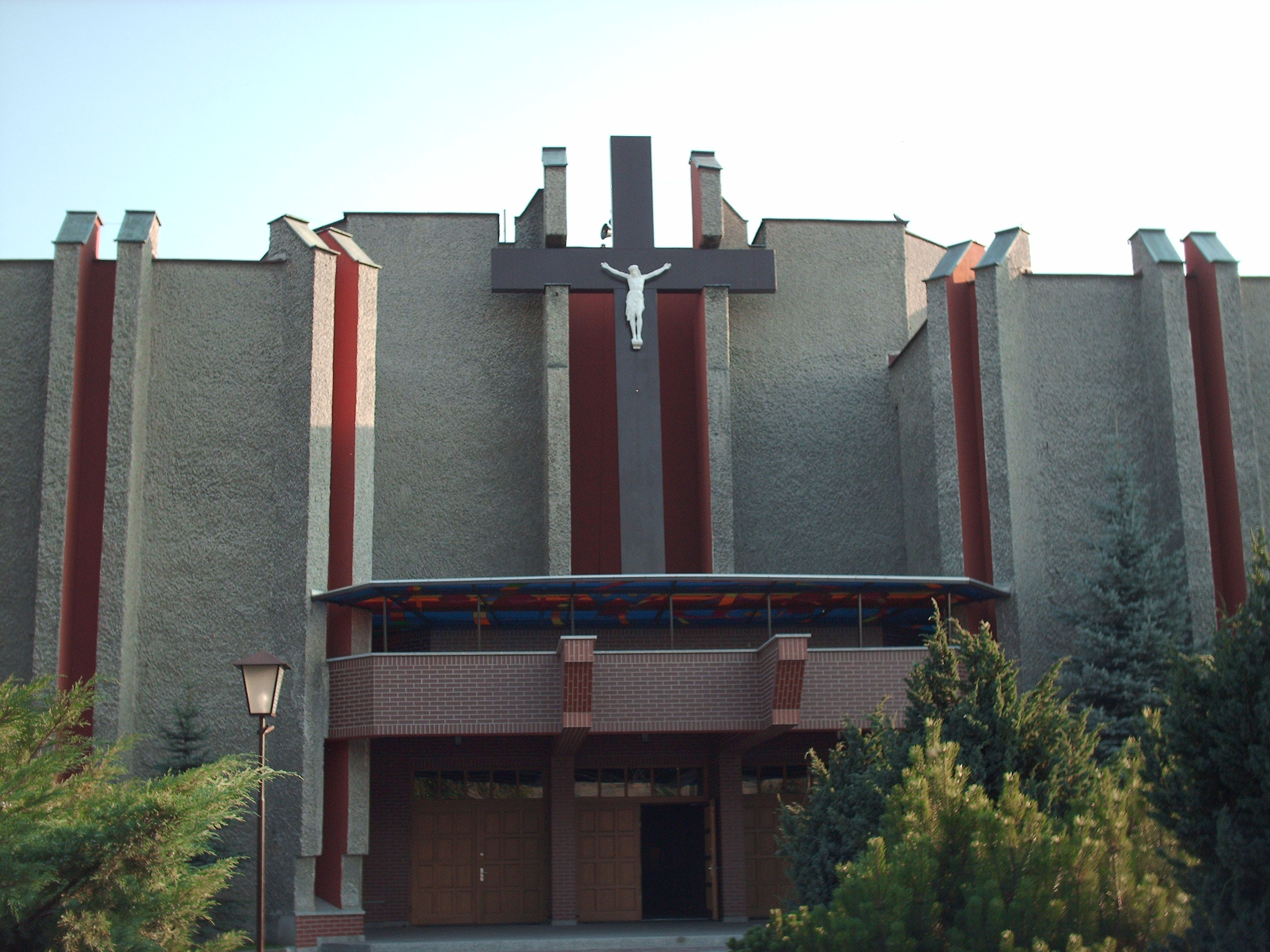 Parafia MBCZ w Gliwicach